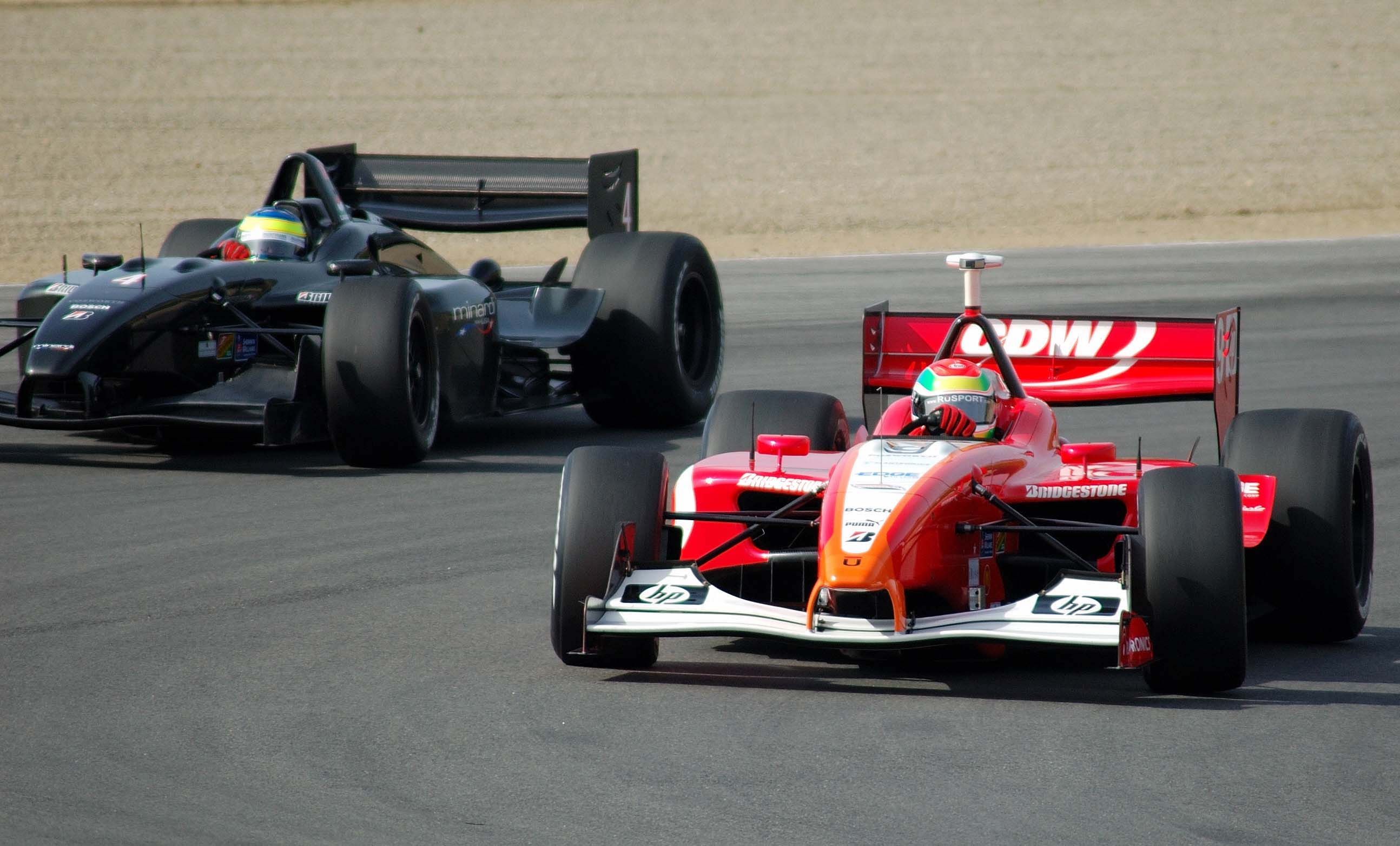 Justin Wilson (CDW/RuSPORT) (à droite) et Zsolt Baumgartner (Minardi Team USA) (à gauche) lors d'essais en ChampCar en 2007 sur le circuit de Laguna Seca.